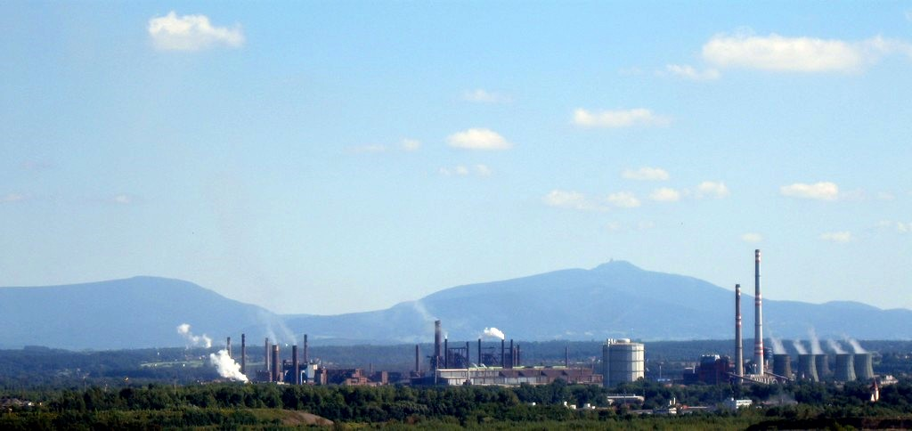 ArcelorMittal Ostrava, pohled z Nové radnice (srpen 2011)